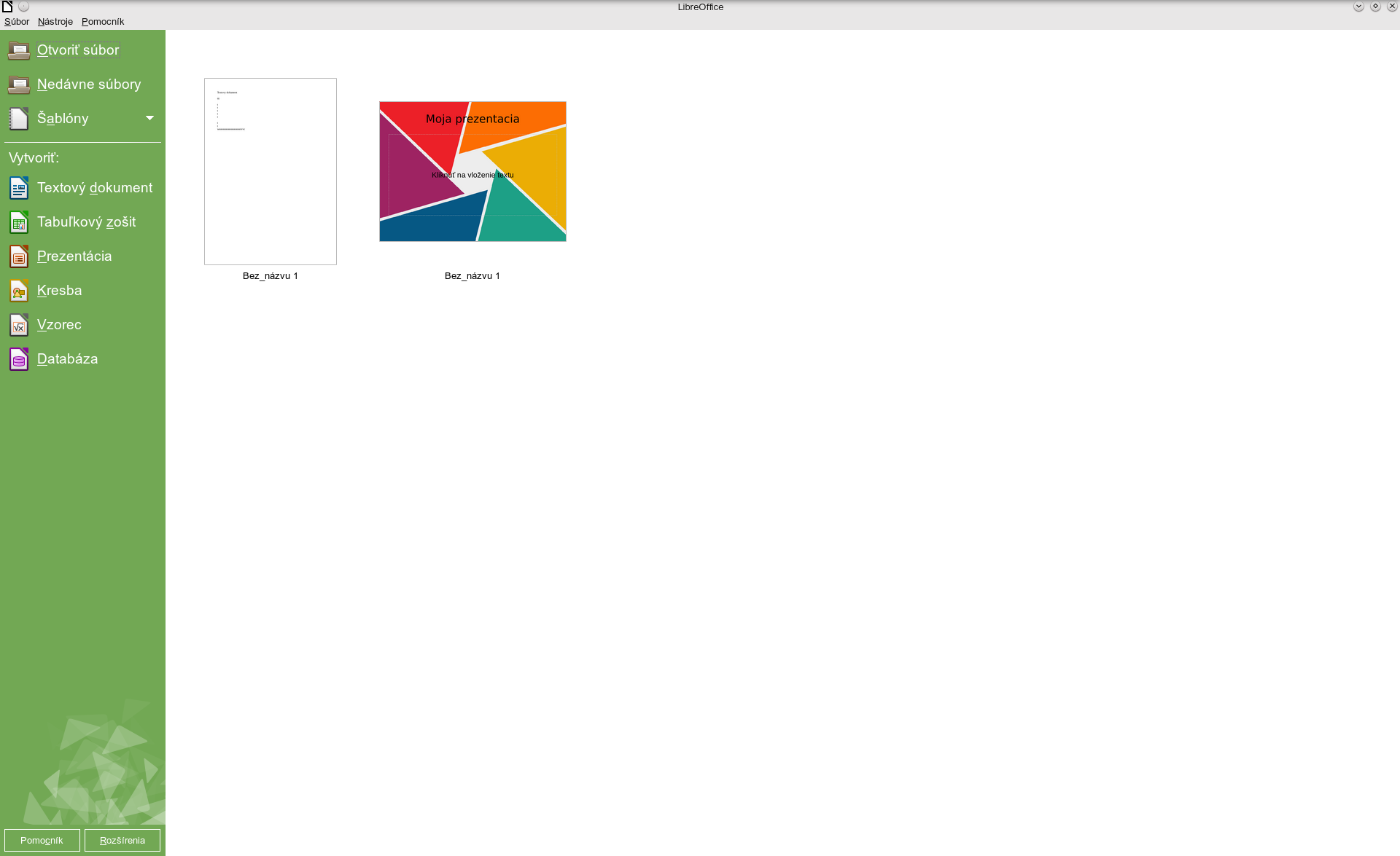 Uvodná obrazovka LibreOffice 4.4